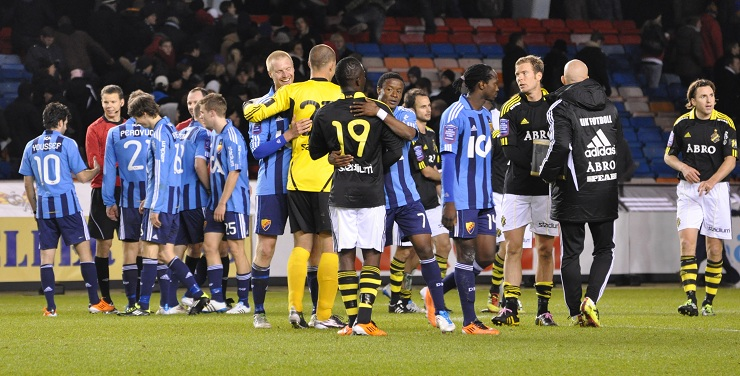 Tvillingderby AIK-Djurgårdens IF (0-0) i Fotbollsallsvenskan på Råsunda fotbollsstadion i Solna. 4 april 2011.